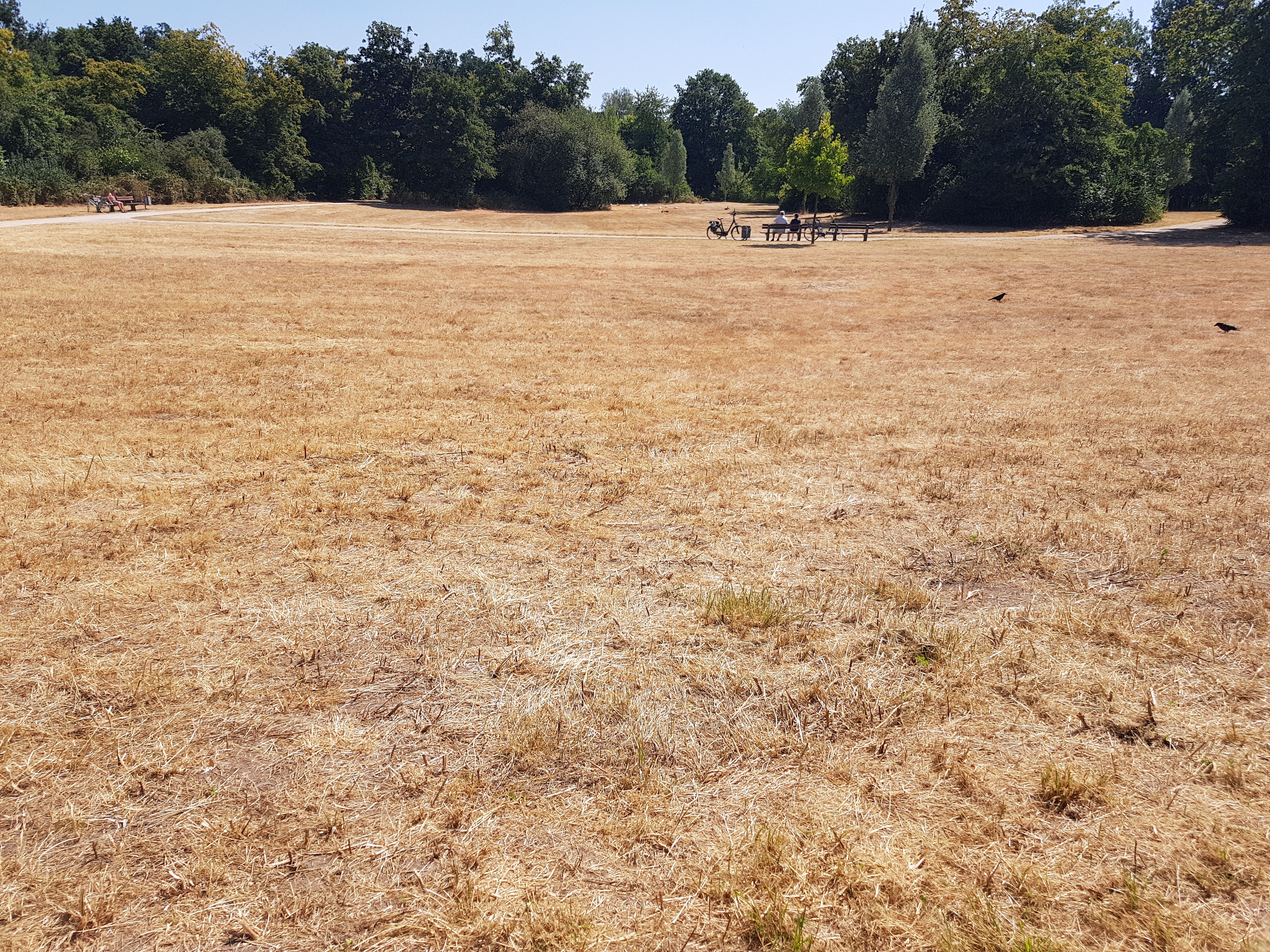 Vertrocknetes Gras bei Kaarst (Dürre 2018)